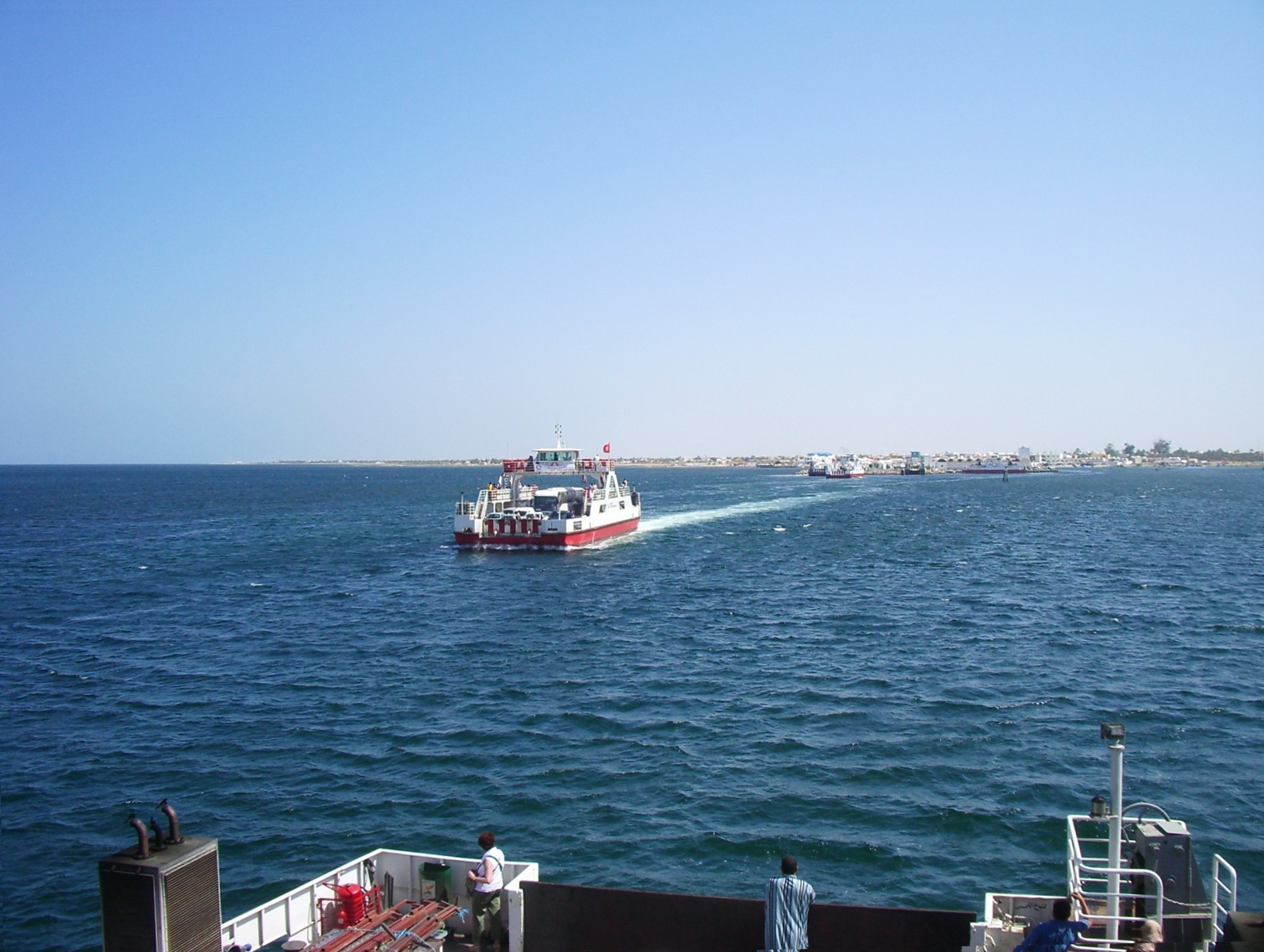 Bac de Djerba (entre Ajim et Jorf), Tunisie